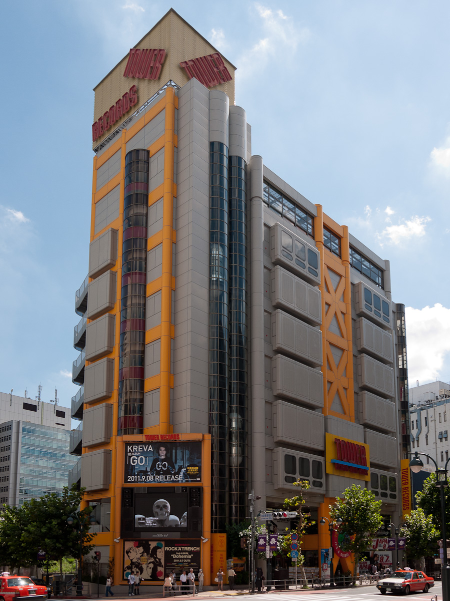 Tower Record Shibuya、東京都渋谷区神南1丁目。旧国鉄渋谷駅荷物扱所。